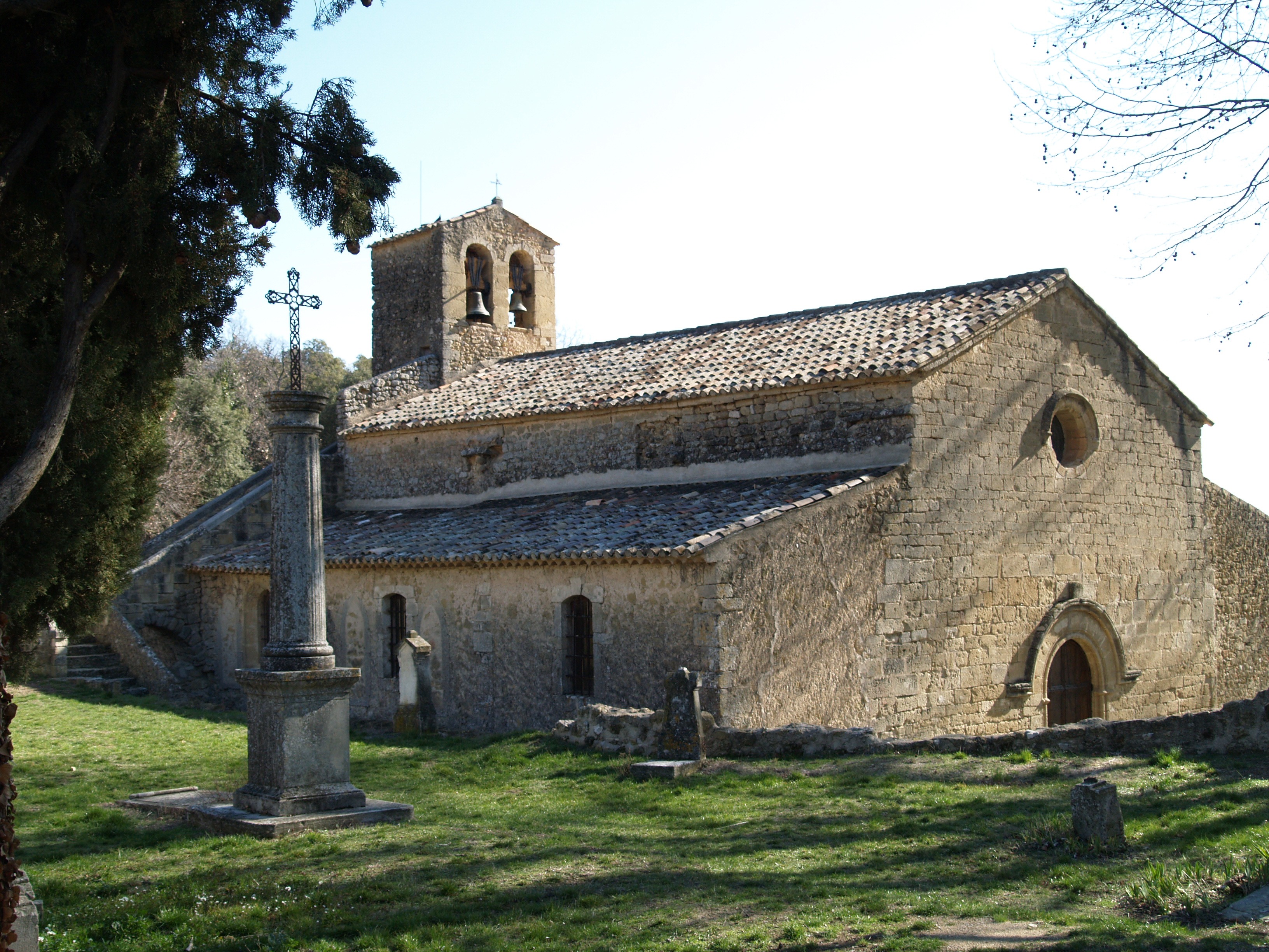 Eglise saint barthelemy - Vaugines